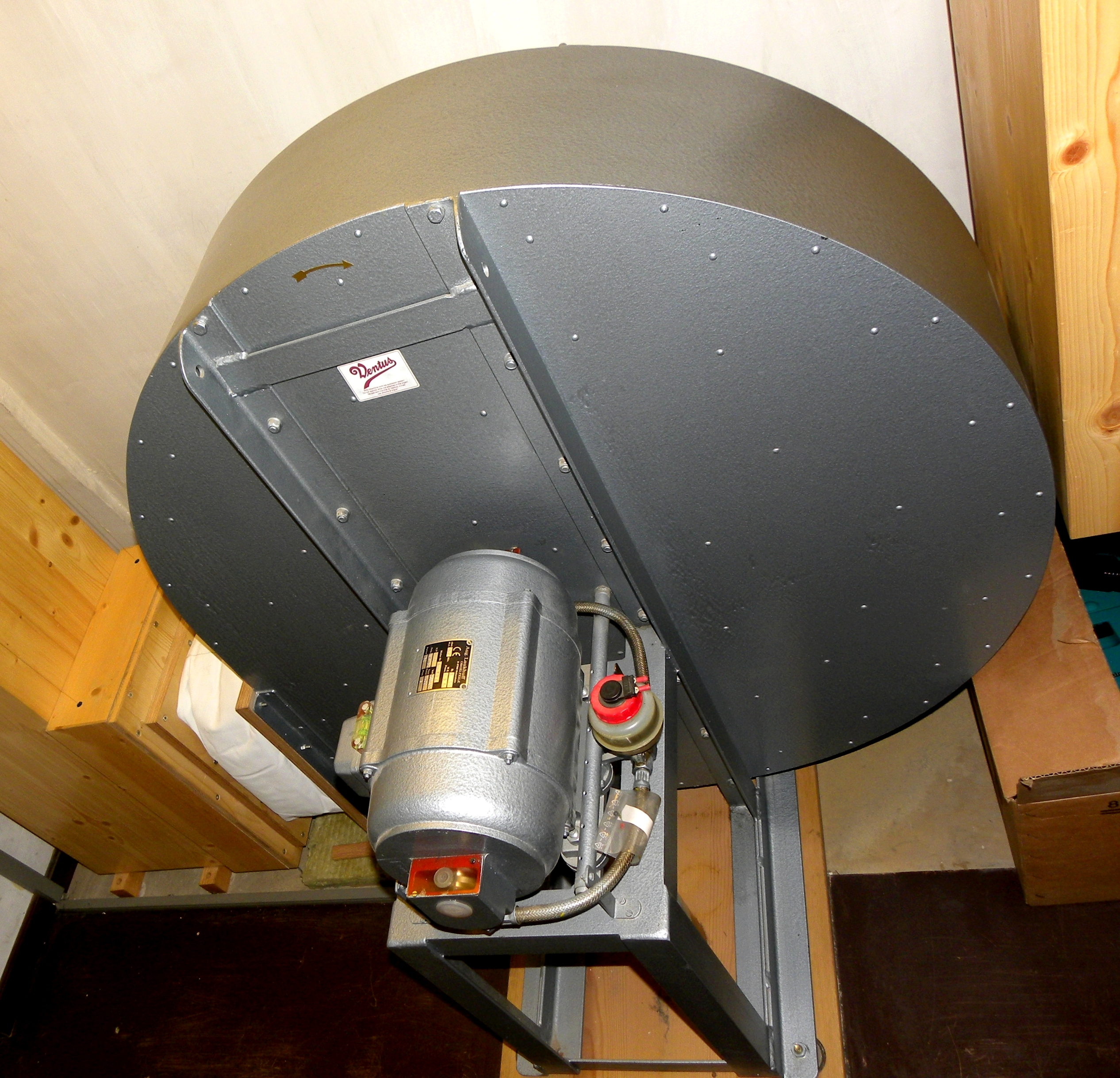 Dmuchawa organowa firmy August Laukhuff - Filharmonia Narodowa w Warszawie